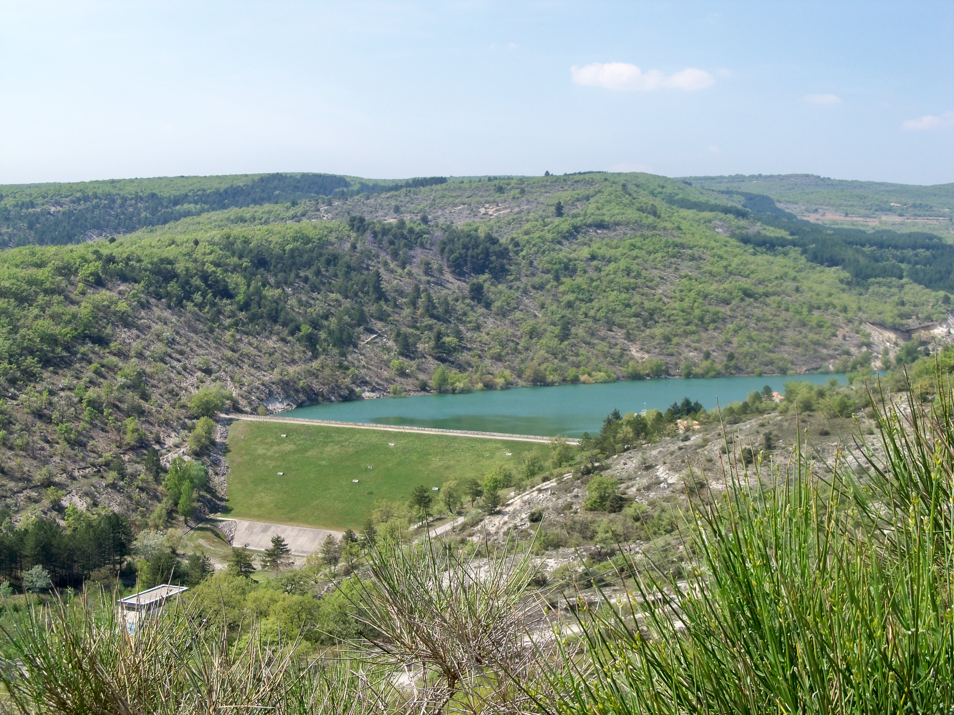 Barrage sur la Laye, près de Mane (04)